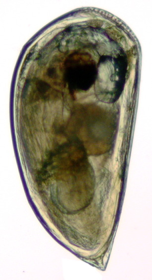 Cipris de cirrípedo